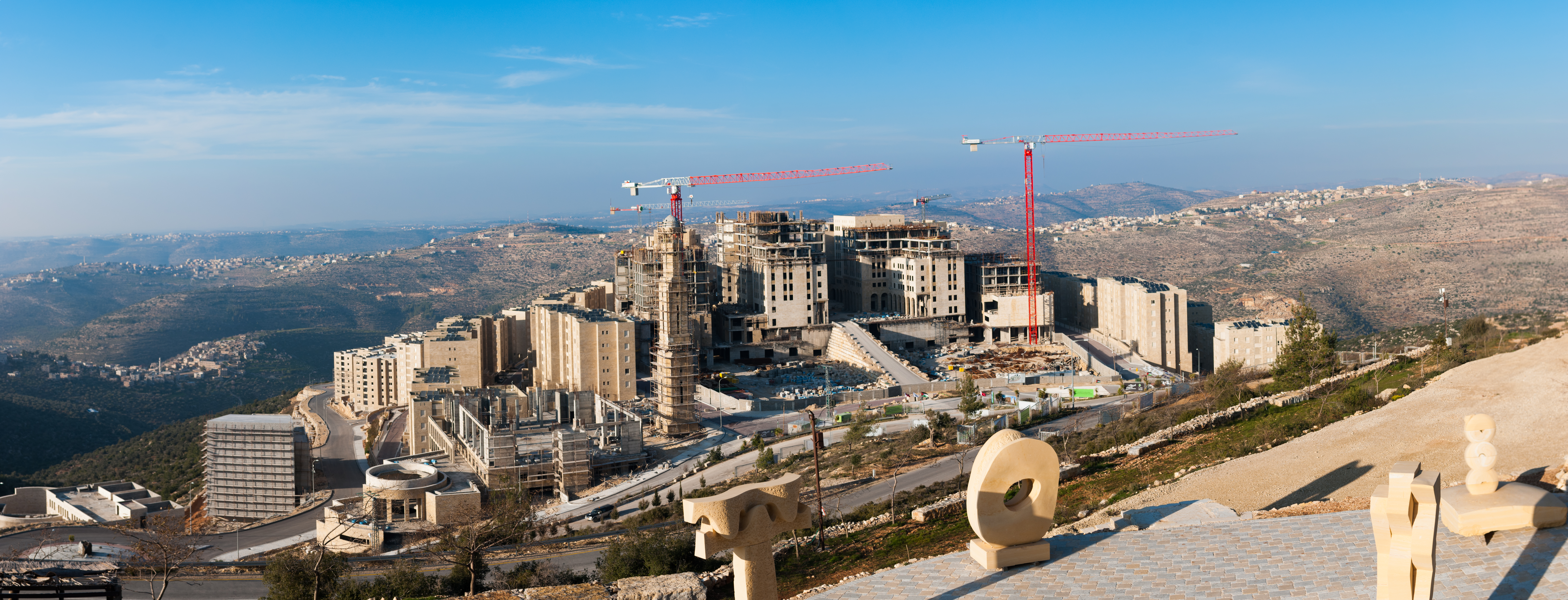 Panorama de la ville de Rawabi